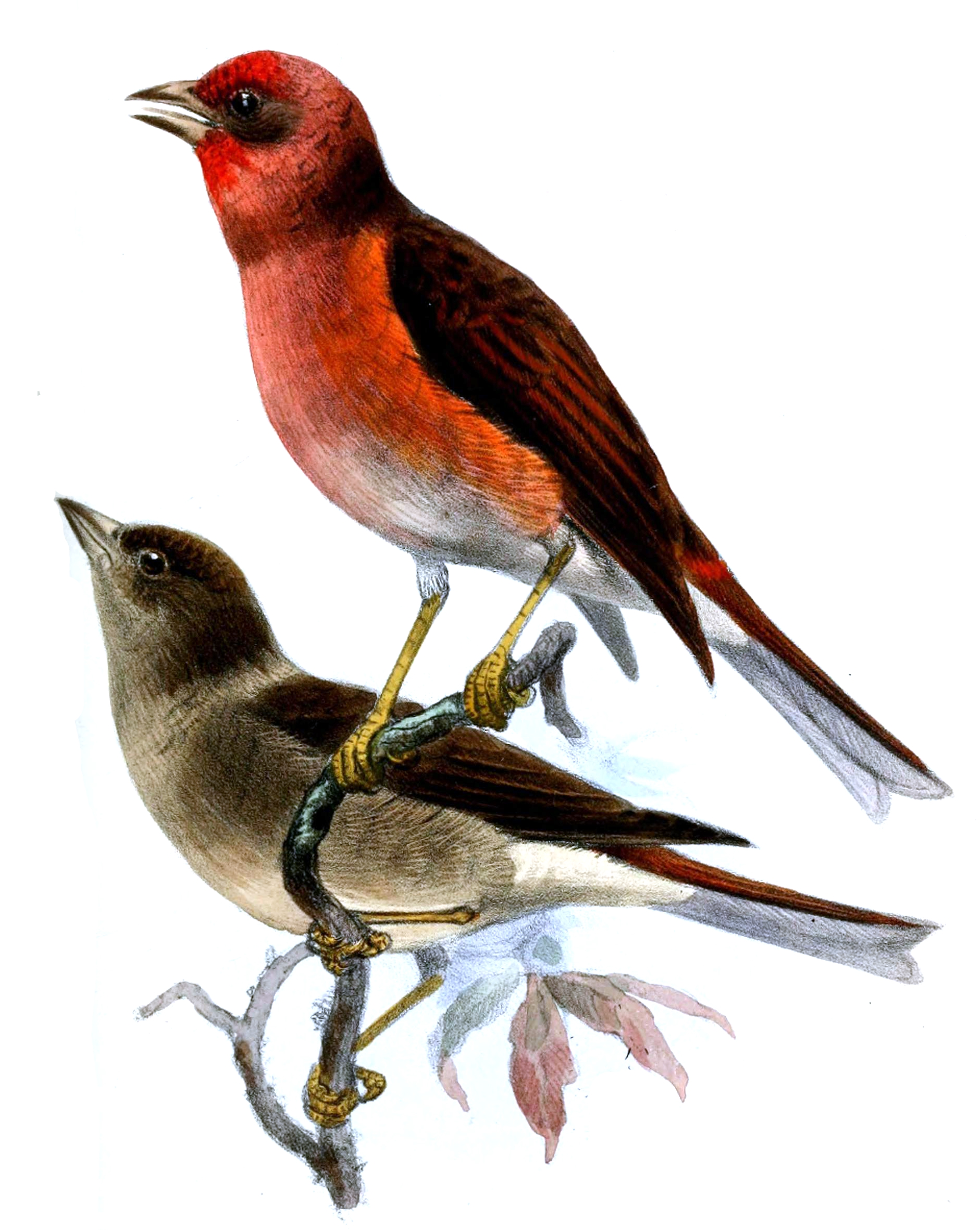 Procarduelis rubescens = Agraphospiza rubescens